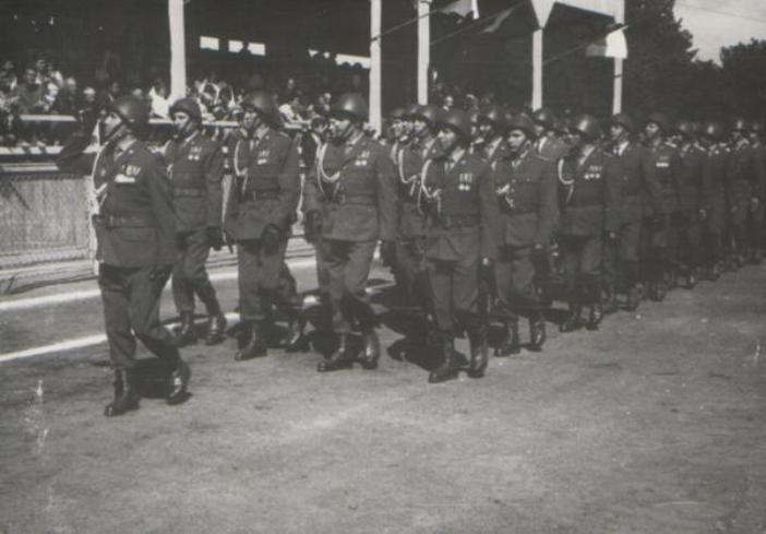 Garnizon Przasnysz, 1971r. Kadra JW 4420 podczas defilady na stadionie miejskim